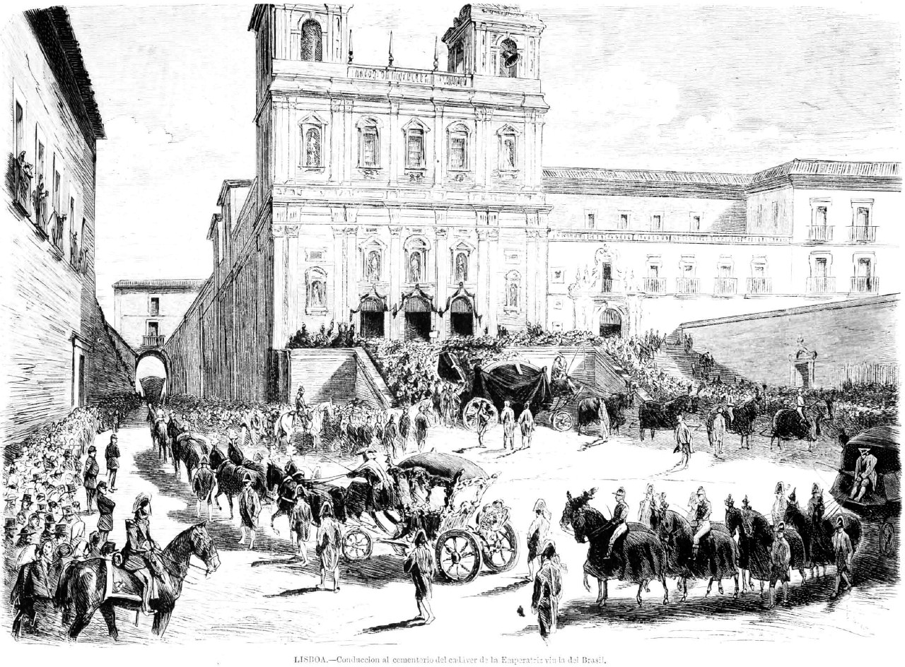 Trauerzug für Amélie von Leuchtenberg in Lissabon